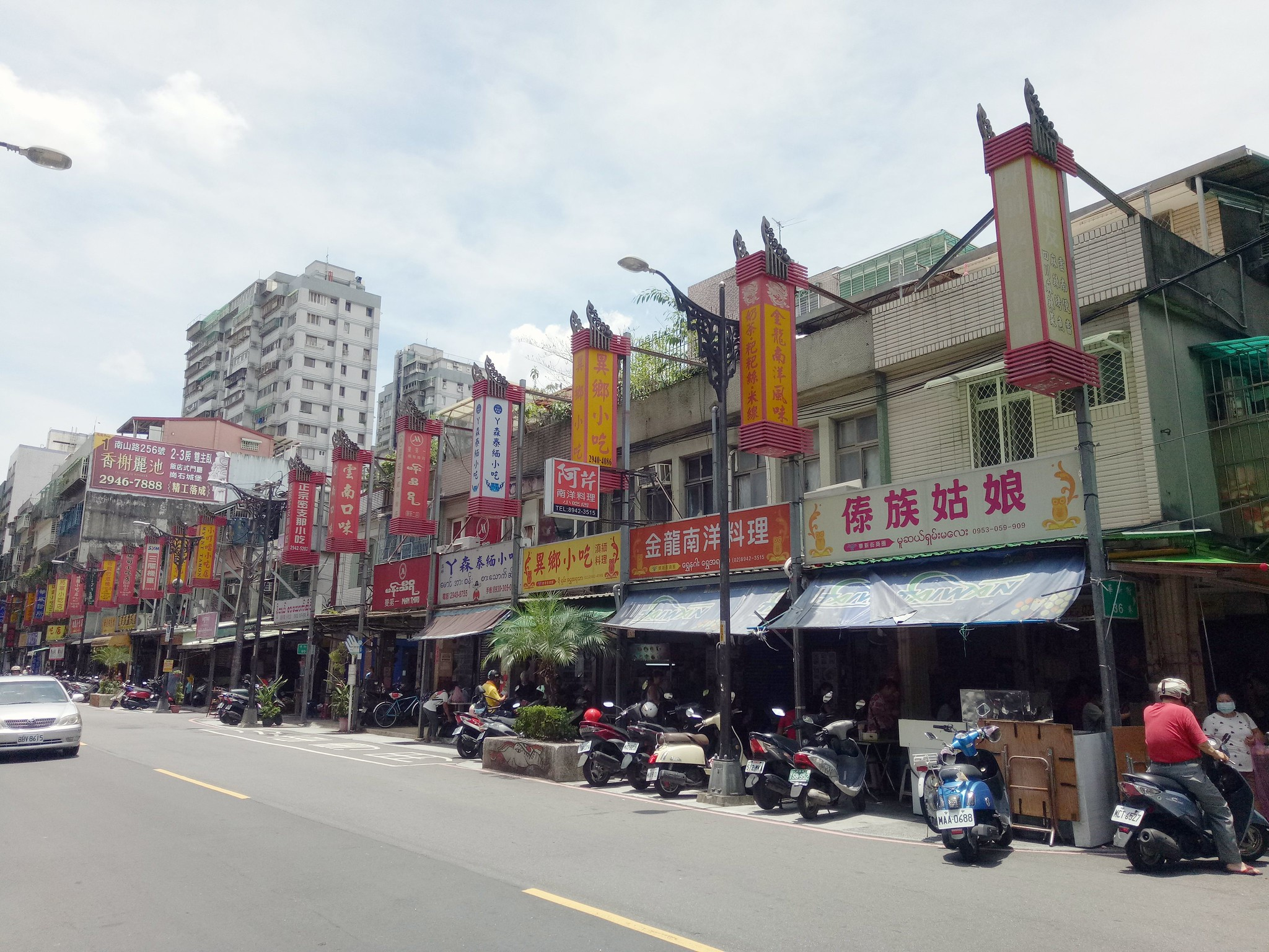 中和華新街商圈一景。